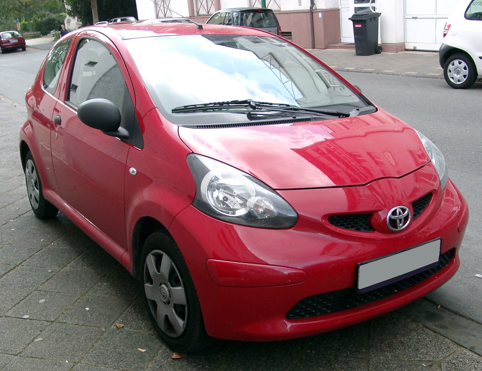 Toyota Aygo